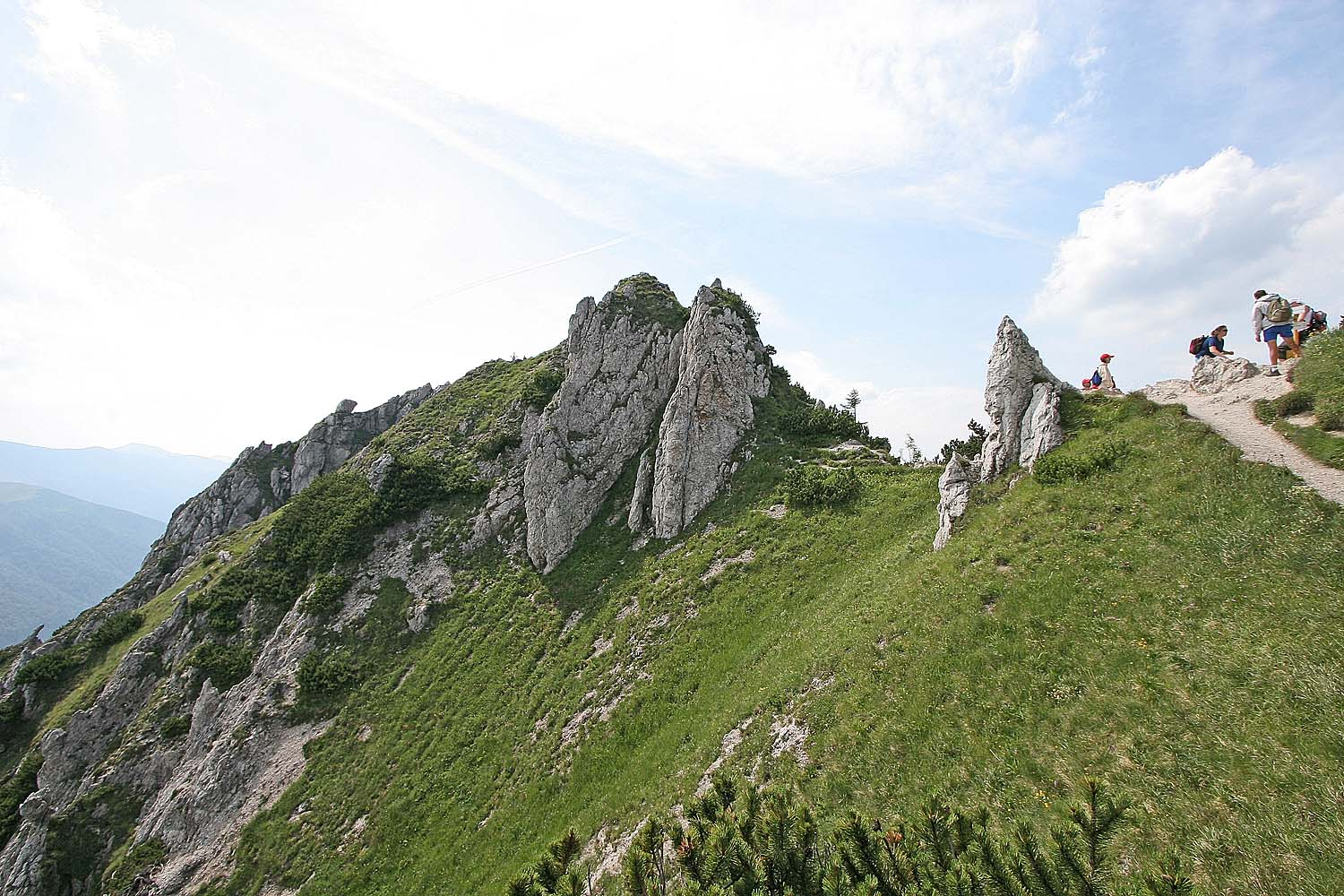 Vrchol Velkého Rozsutce v červenci 2007